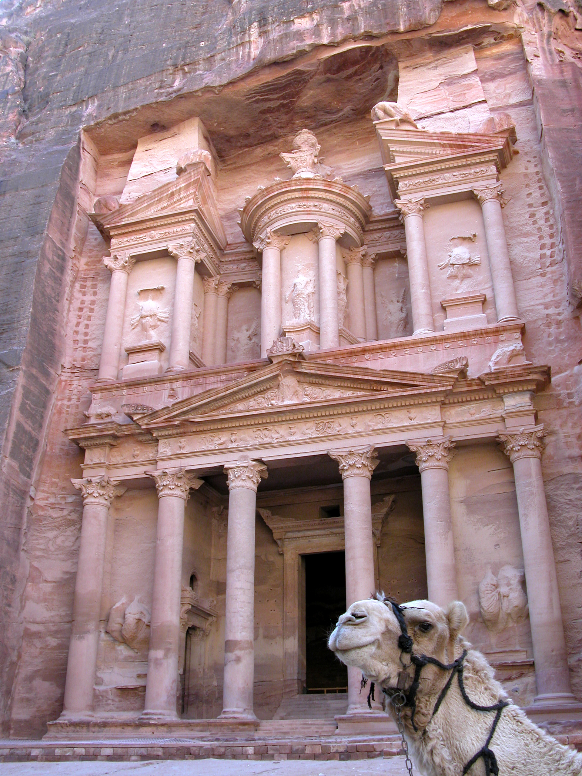 Jordanie, temple a petra